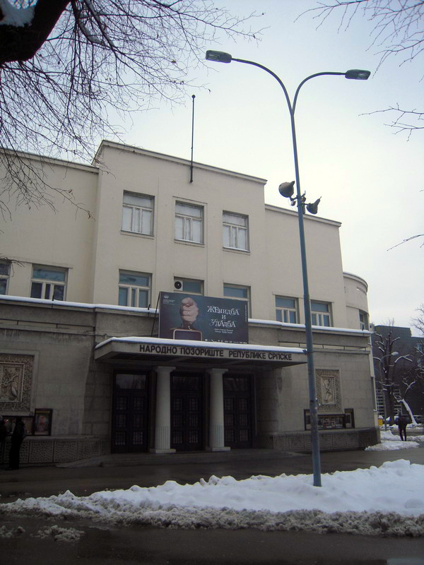 Народно_Позориште_Републике_Српске